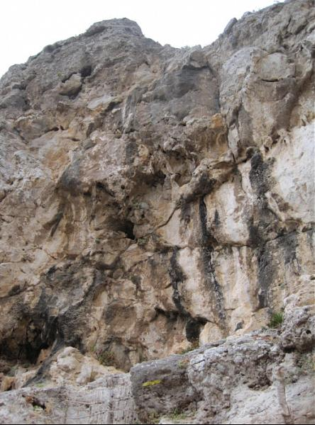 Esta cueva y abrigo se descubrió casualmente en 2001. El abrigo cuenta con más de 50 metros cuadrados de sedimentos y más de 5 metros de potencia, lo cual es realmente excepcional en este tipo de yacimientos, con unos niveles de brechas y un fabuloso estado de conservación. De los 10 estratos, 7 presentan ocupación humana, siendo los más interesantes los fechados en el Paleolítico Medio. En el caso de la cueva, la ocupación más interesante es Neolítica, aunque los vestigios más antiguos se fechan ya en el Paleolítico Medio